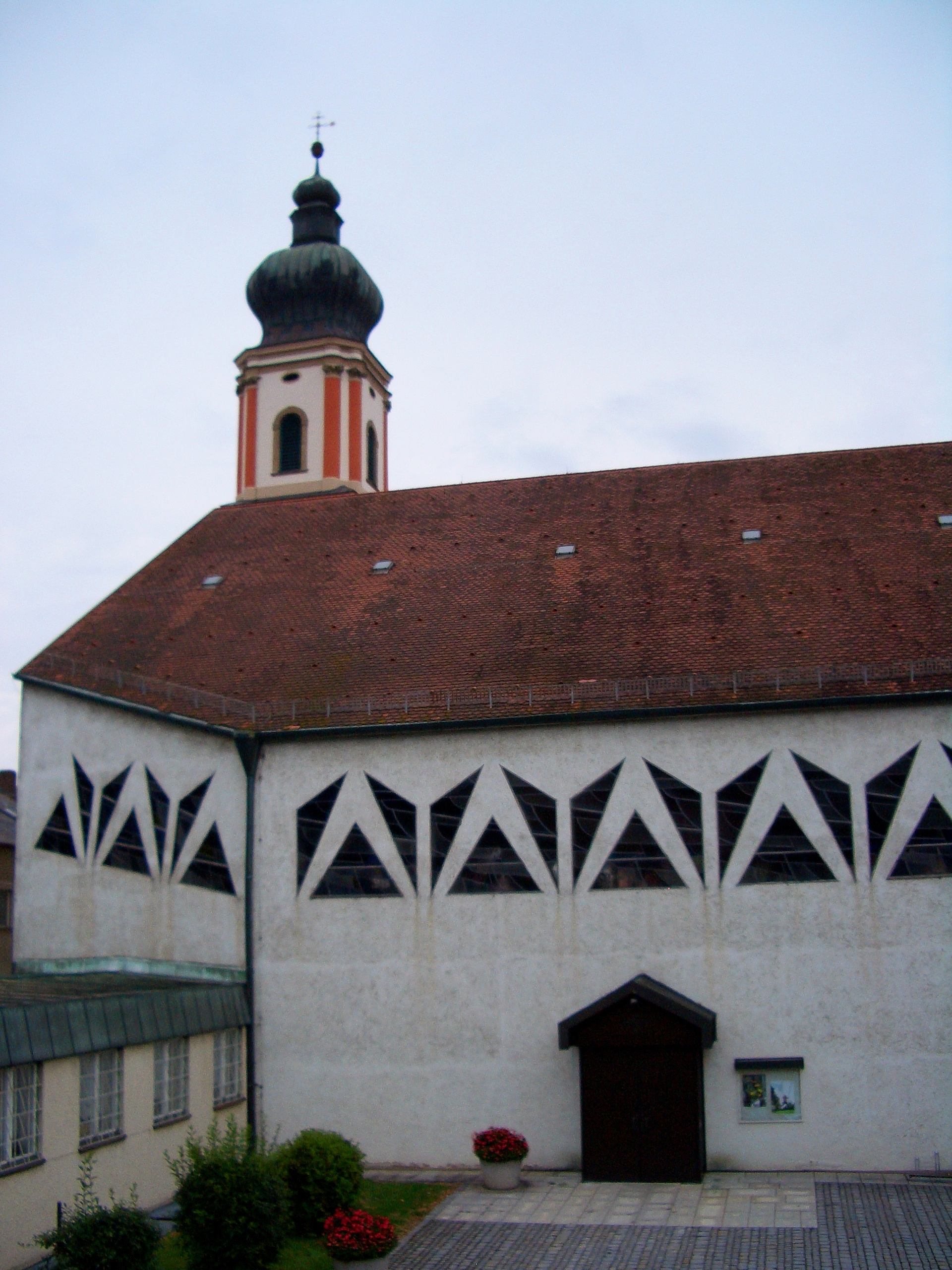 St. Pankrazius in Roding Kirche und Kirchturm